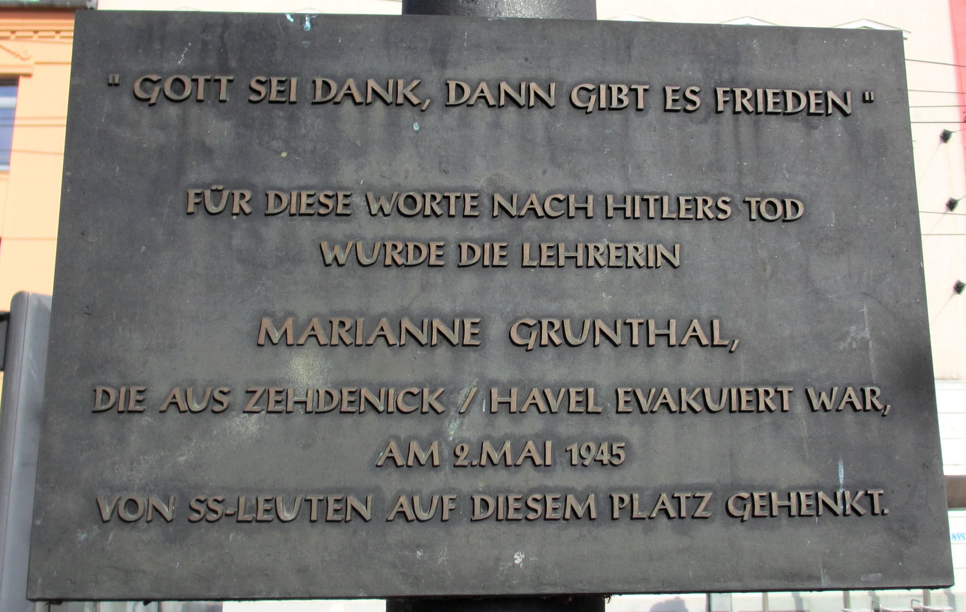 Schwerin Hauptbahnhof, Bahnhofsvorplatz = Grunthalplatz, Gedächtnisplakette für die Lehrerin Marianne Grunthal